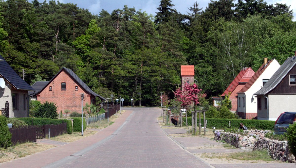 Das Dorf Zwenzow bei Userin, Blick entlang der Hauptstraße nach Norden. (Foto wurde beschnitten und farbkorrigert)